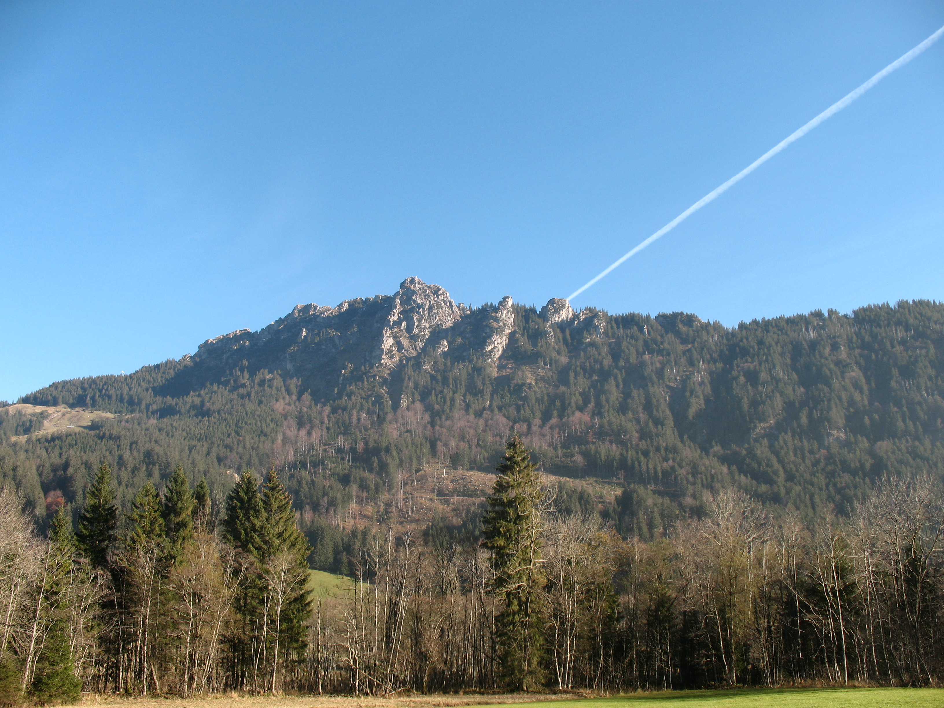 Blick vom Straßenrand der B310 auf den Sorgschrofen (1635 m)